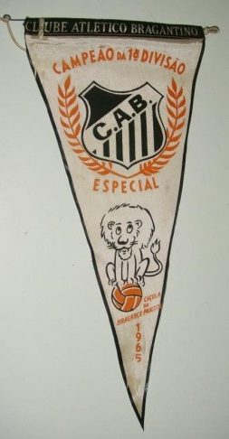 Flamula comemorativa do Bragantino - Campeão Paulista da Segunda Divisão de 1965